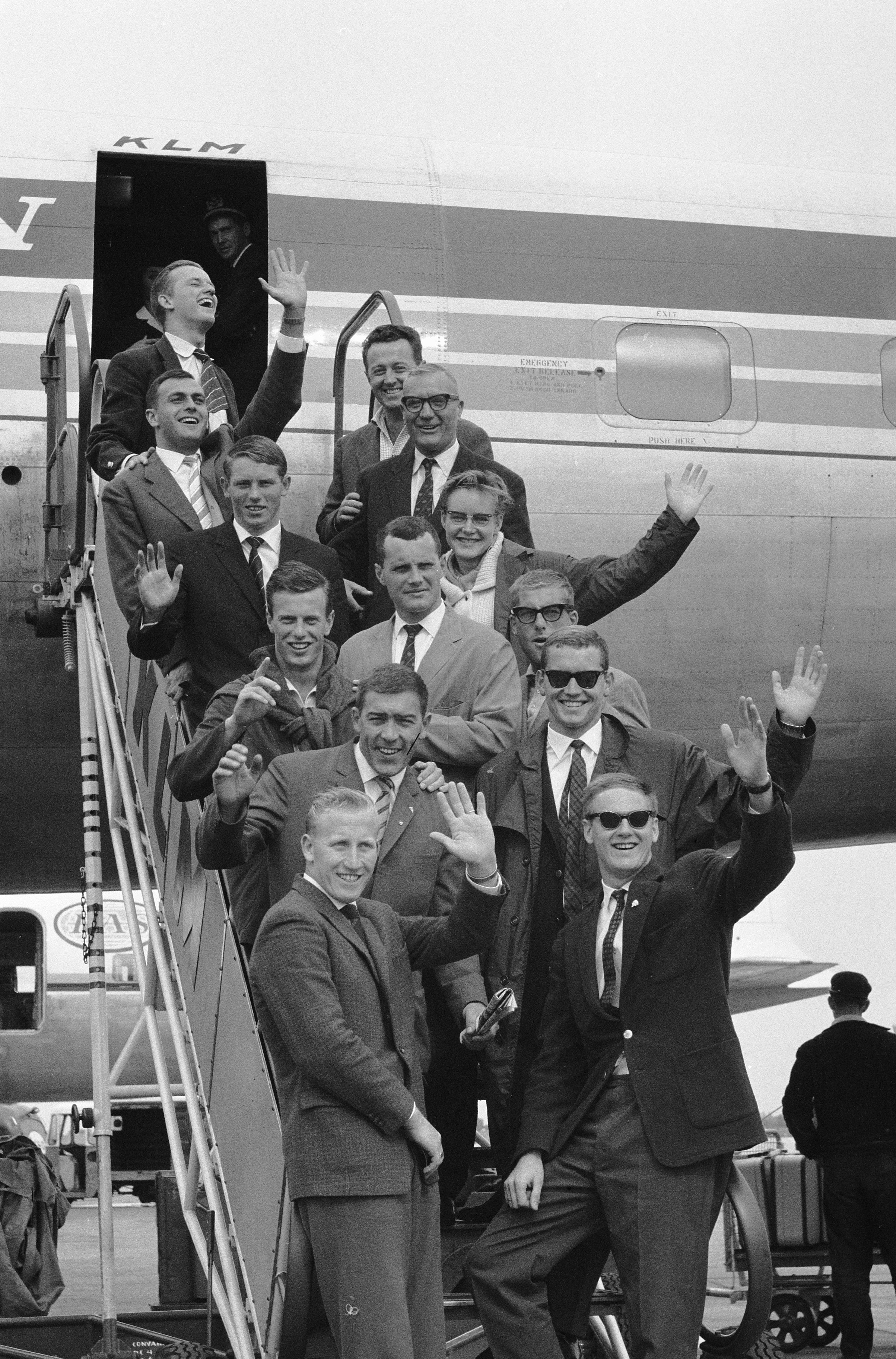 Collectie / Archief : Fotocollectie Anefo Reportage / Serie : [ onbekend ] Beschrijving : Vertrek Nederlandse waterpoloploeg naar Rome Datum : 1 augustus 1960 Locatie : Italië, Rome Trefwoorden : vertrekken, waterpoloploegen Fotograaf : Pot, Harry / Anefo Auteursrechthebbende : Nationaal Archief Materiaalsoort : Negatief (zwart/wit) Nummer archiefinventaris : bekijk toegang 2.24.01.05 Bestanddeelnummer : 911-4700